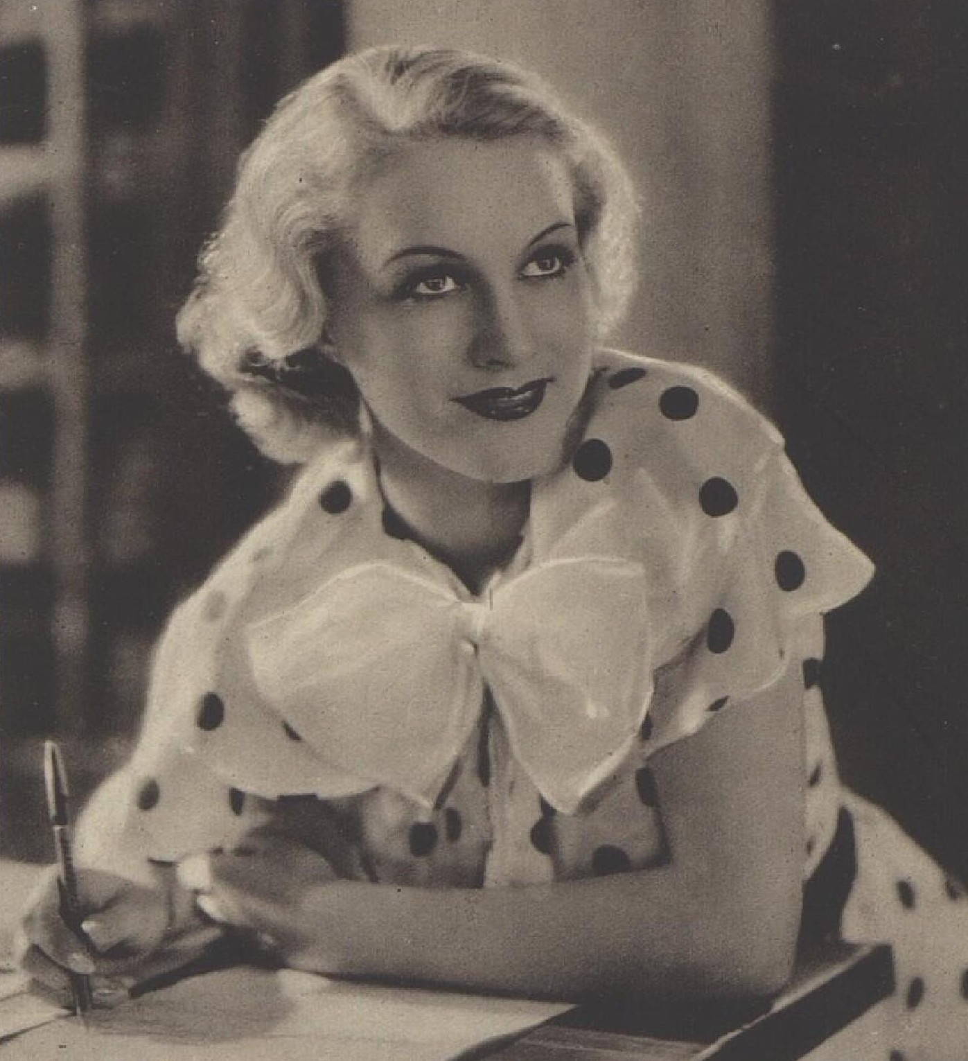 Adina Mandlová (1910-1991), česká filmová a divadelní herečka